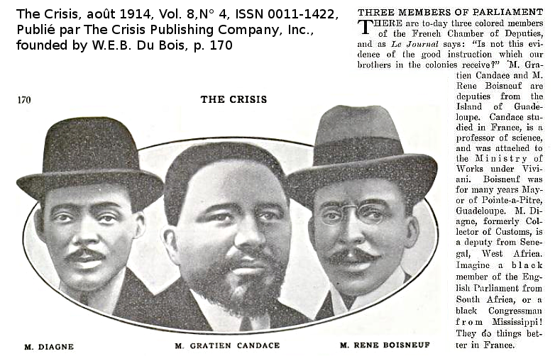 Article Three members of Parliament, The Crisis, août 1914, Vol. 8,N° 4, ISSN 0011-1422, Publié par The Crisis Publishing Company, Inc., founded by W.E.B. Du Bois, p. 170